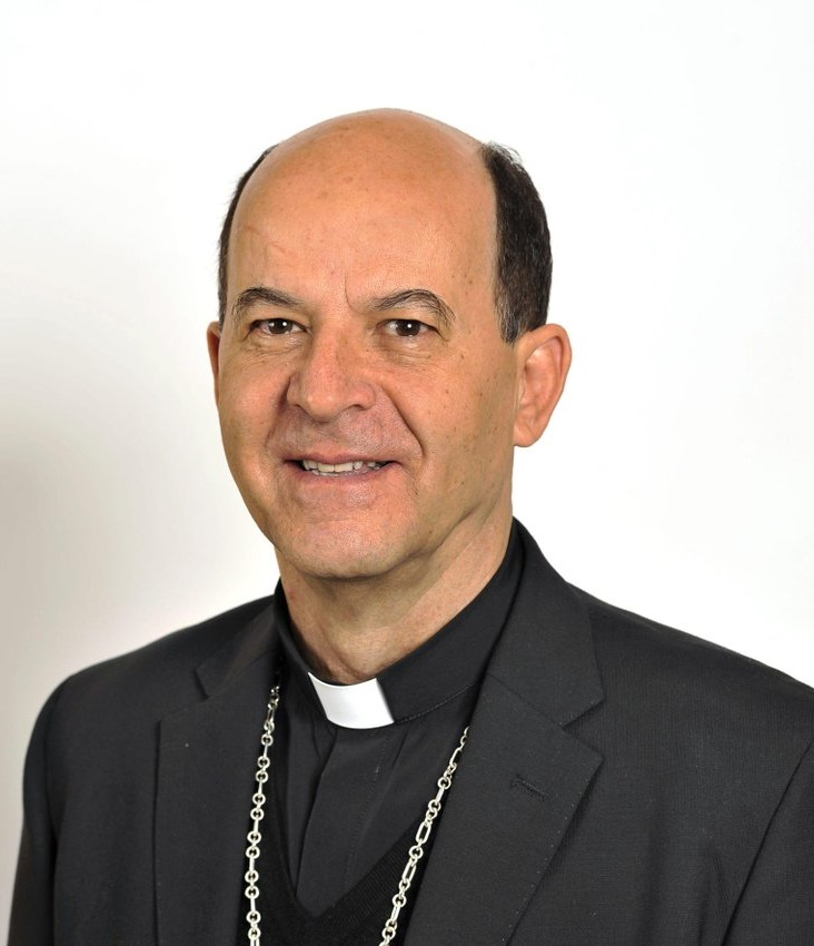 Arzobispo Mons. Constancio Miranda Weckmann